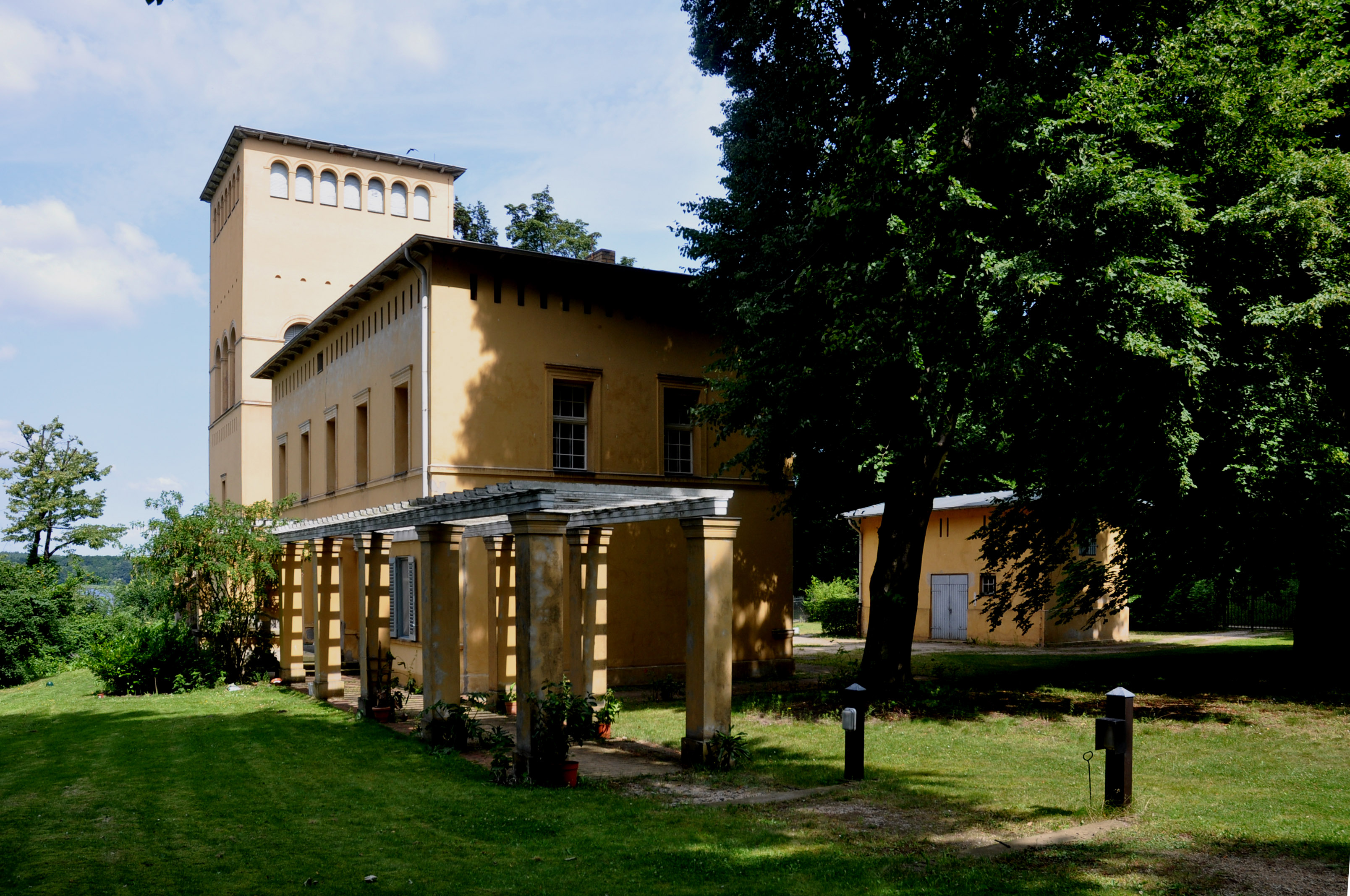 Das Hofgärtnerhaus von Osten